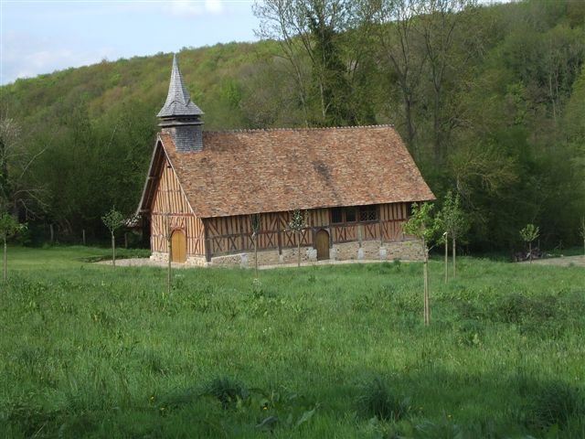 Chapelle Saint Firmin